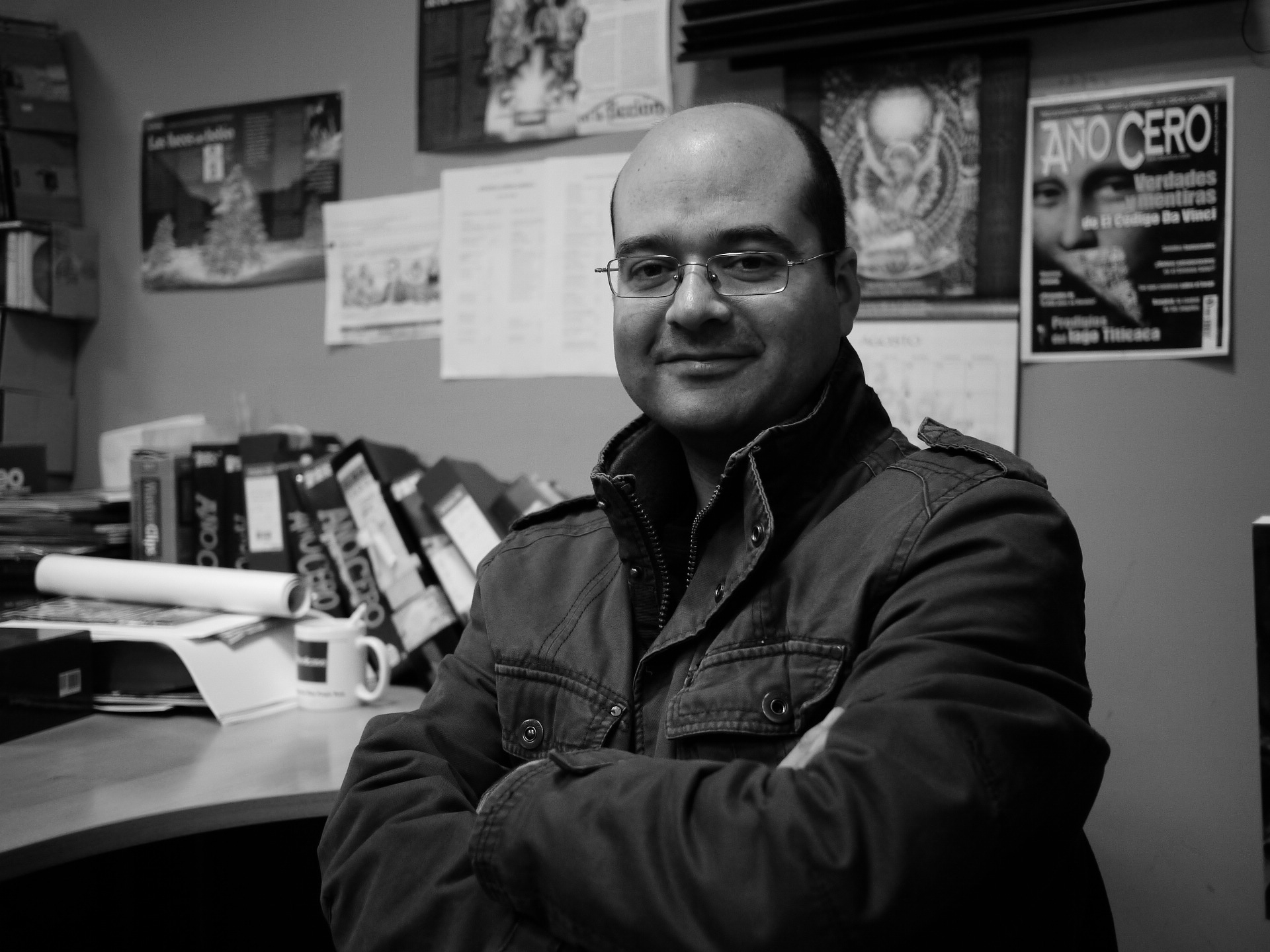 Fotografía del escritor y periodista MIGUEL PEDRERO